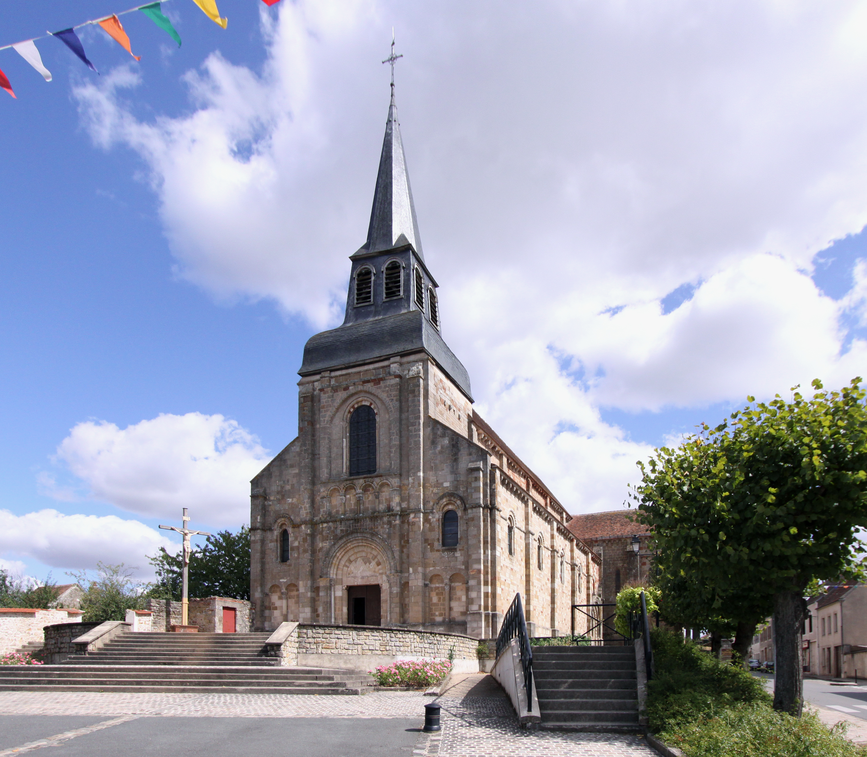 Romanische Kirche Saint-Genès in Châteaumeillant im französischen Département Cher